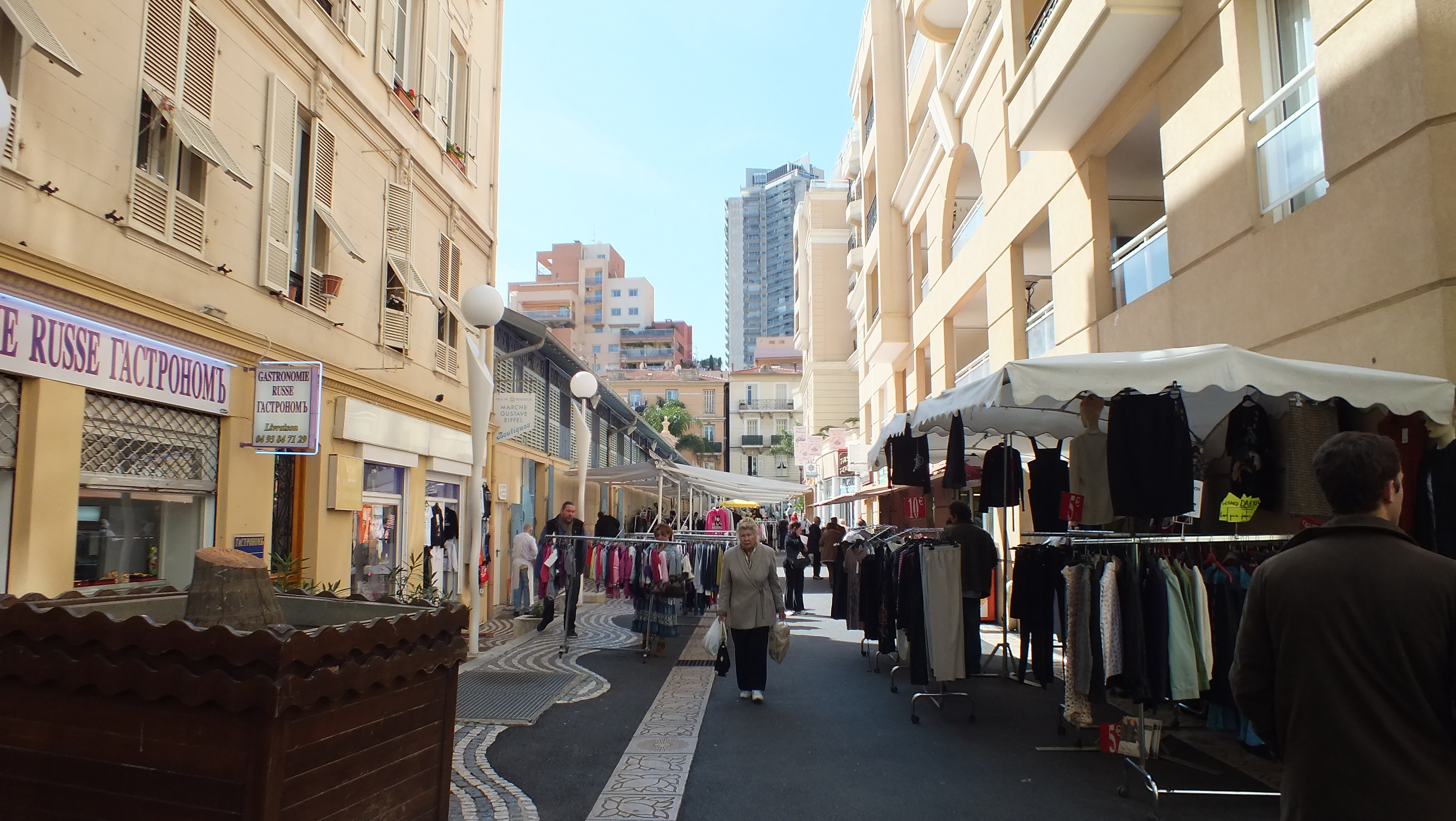 Place du marché de Beausoleil, au sud-est de la France (code postal 06240)